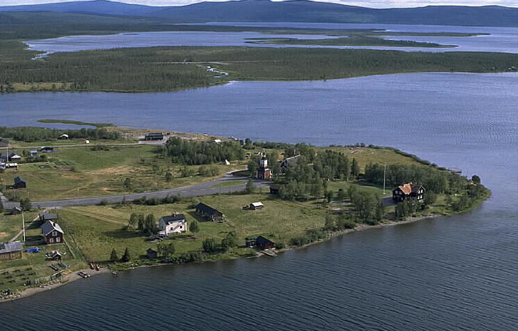 Jukkasjärvi kyrka i bildens mitt. Motiv: Jukkasjärvi Nyckelord: Flygbilder, Riksintressen Kategori: Insjömiljöer Jukkasjärvi kyrka i bildens mitt.